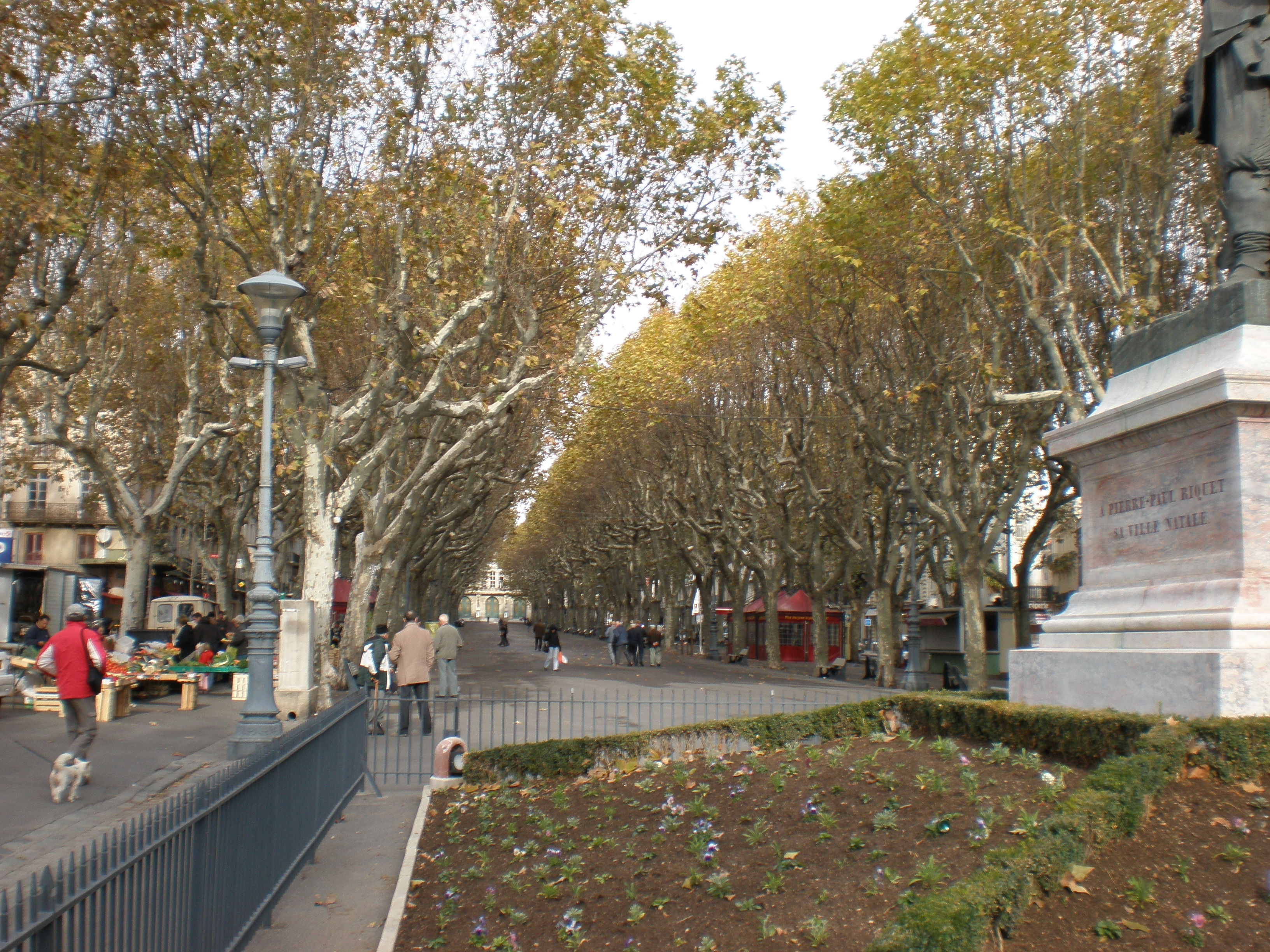 Les allées Paul Riquet à Béziers (Hérault - France) vues depuis la statue de Pierre-Paul Riquet